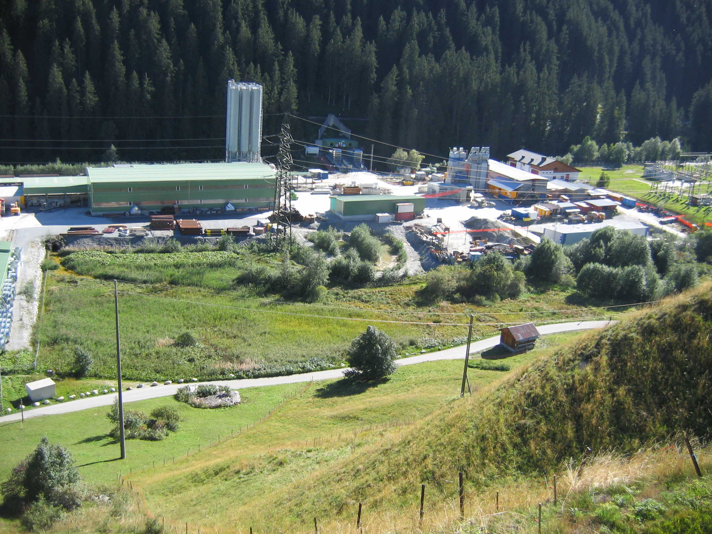 NEAT-Baustelle Sedrun